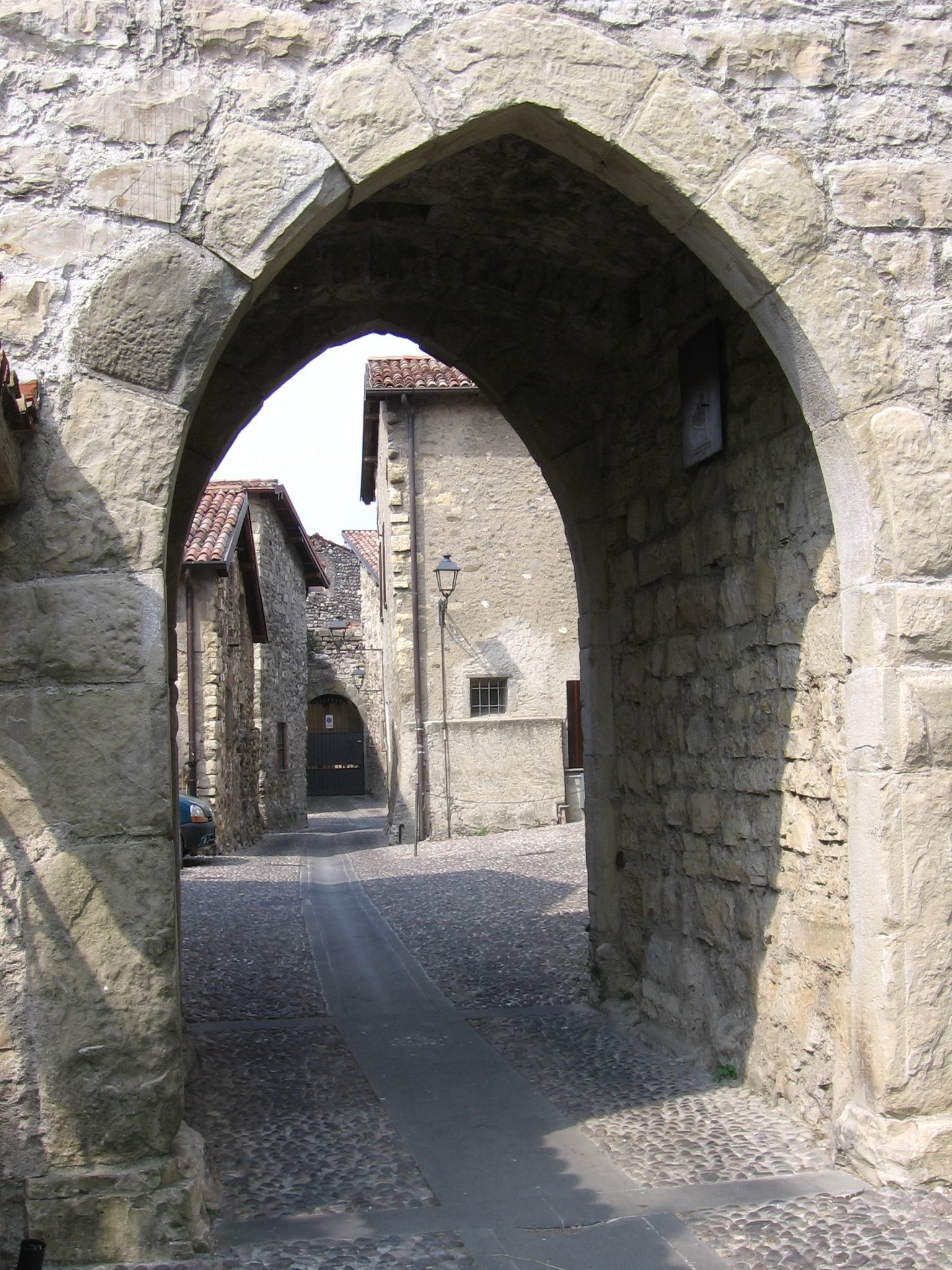 Castello di Trebecco (X sec.), Credaro, Bergamo, Italia